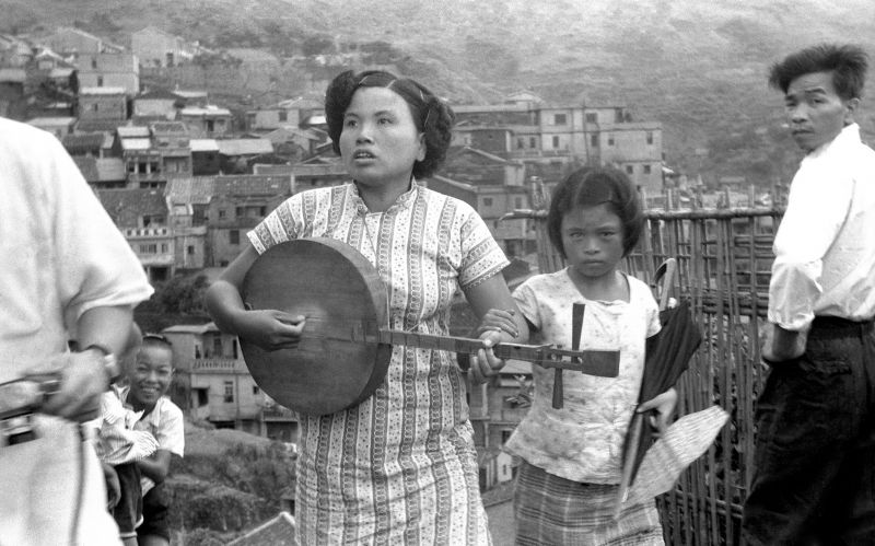 在九份賣唱的盲女。 A likely southern yueqin; two strings, no large soundholes, long-neck.[1]There was also a three stringed version.[2] Soundhold for the instrument was a small hole near the bridge.[1][2]